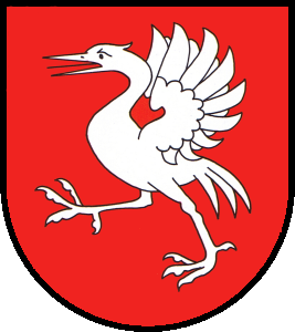 Wappen des Greyerzbezirk